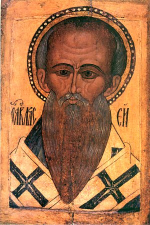 Священномученик Власий Севастийский